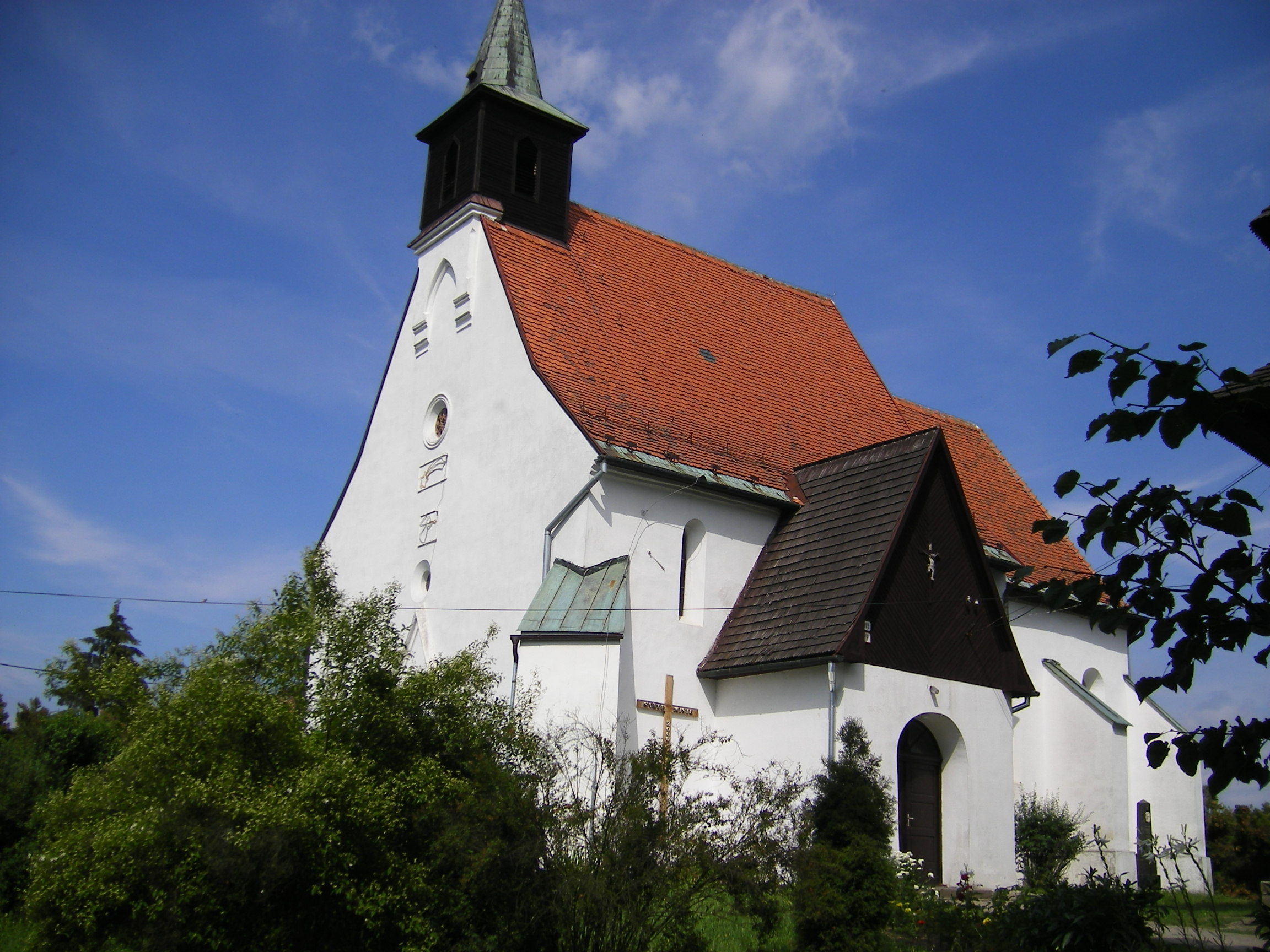 Sliač (okres Zvolen)